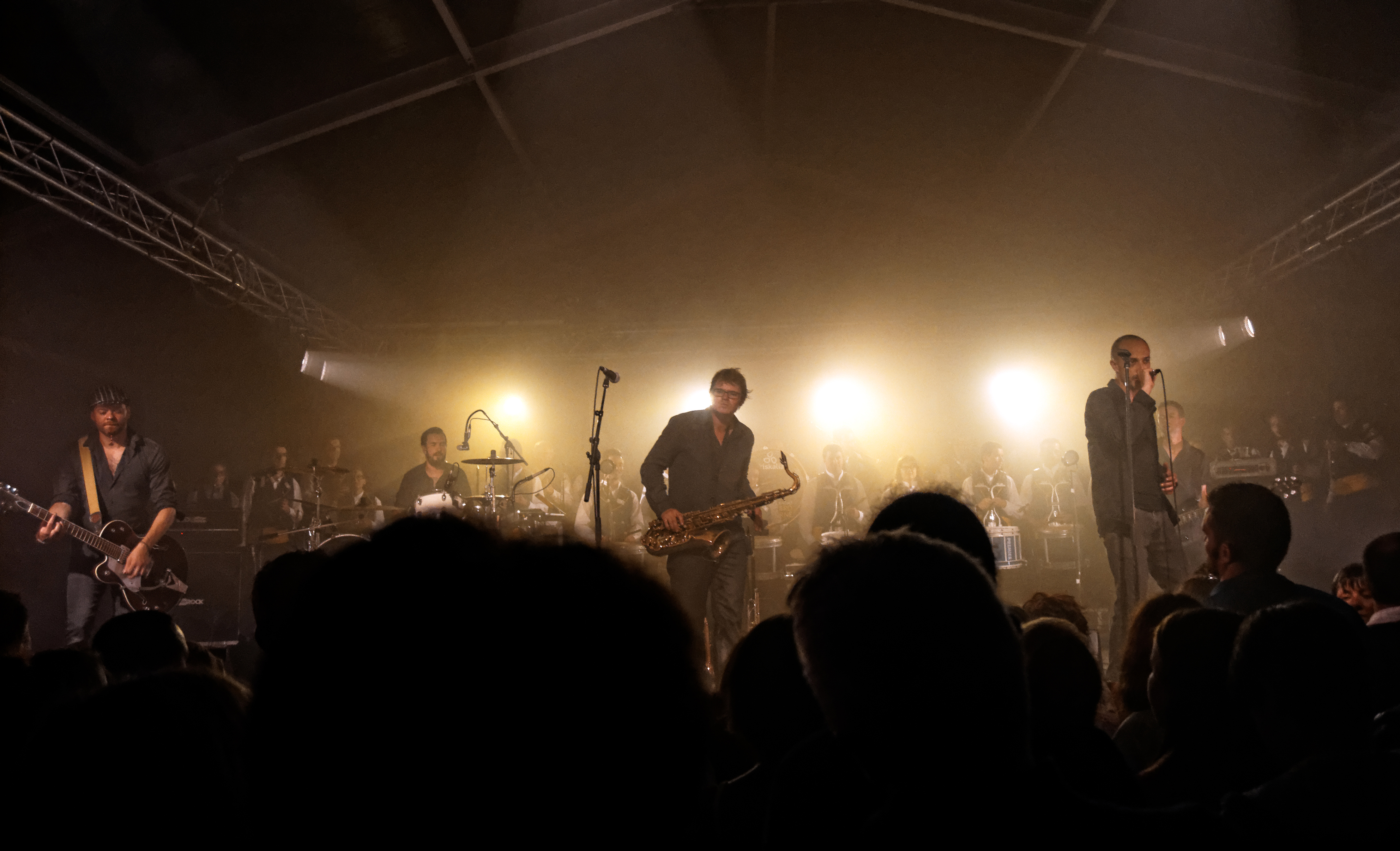 Merzhin en concert pour les 20 ans du bagad Bro Landerne au festival Kan al Loar le 13 juillet 2015.